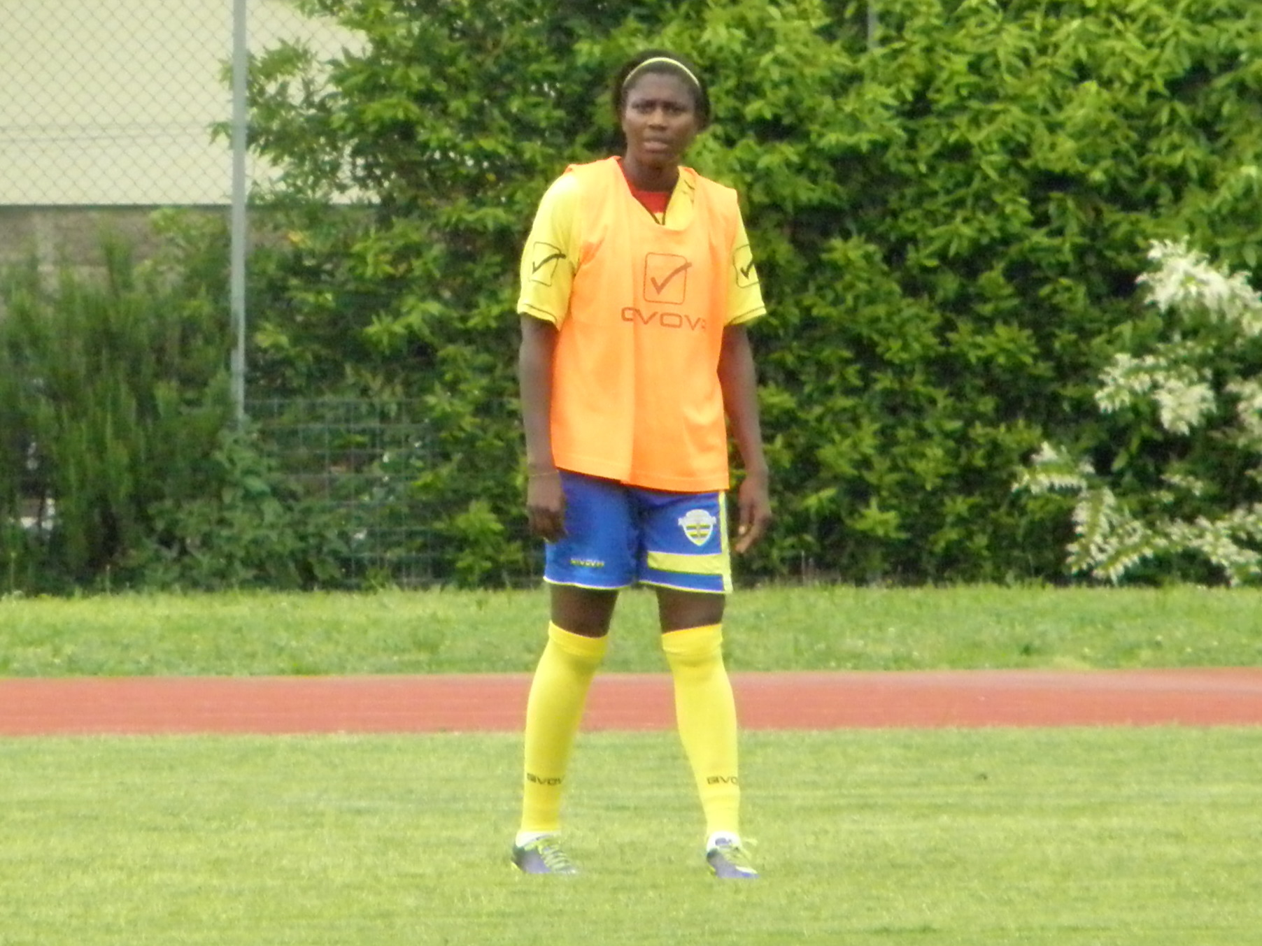 Abano Terme, 23 maggio 2015, finale di Coppa Italia di calcio femminile 2014-2015. Bissoli durante il riscaldamento prepartita.